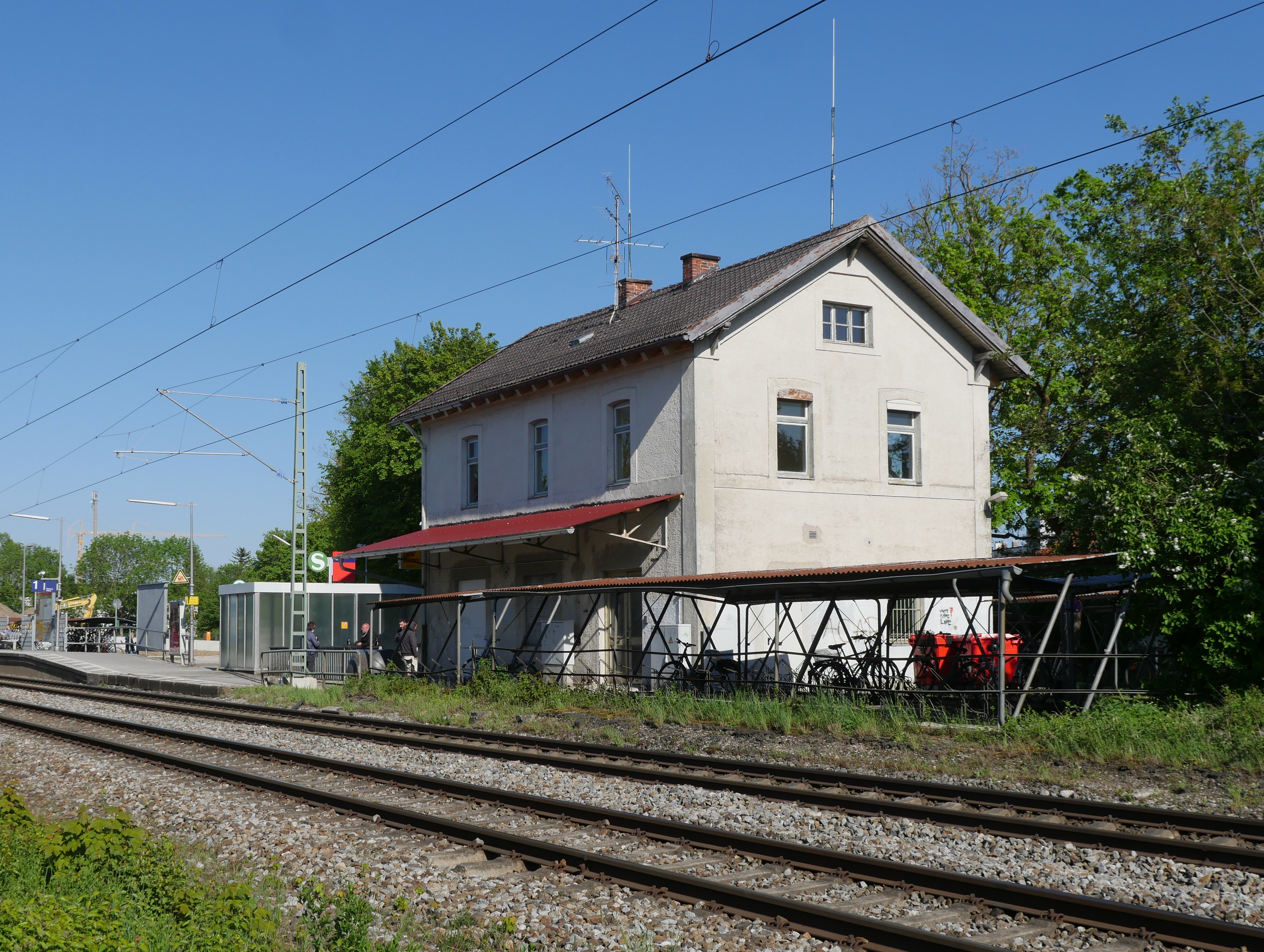 Empfangsgebäude des Bahnhofs Poing von der Gleisseite, links der südliche Seitenbahnsteig für die Züge Richtung Markt Schwaben und der Treppenabgang zur Bahnsteigunterführung. Ansicht von Nordwesten.